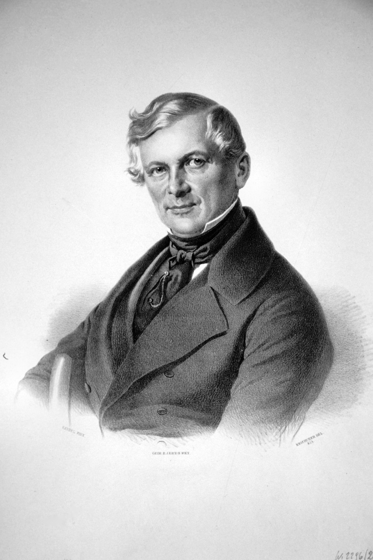 Josef Graf Ugarte (1804-1862), österreichischer Diplomat Lithographie von Josef Kriehuber nach einem Gemälde von Randel, 1853